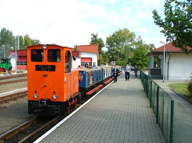 Kolej parkowa (Parkeisenbahn) w Cottbus.